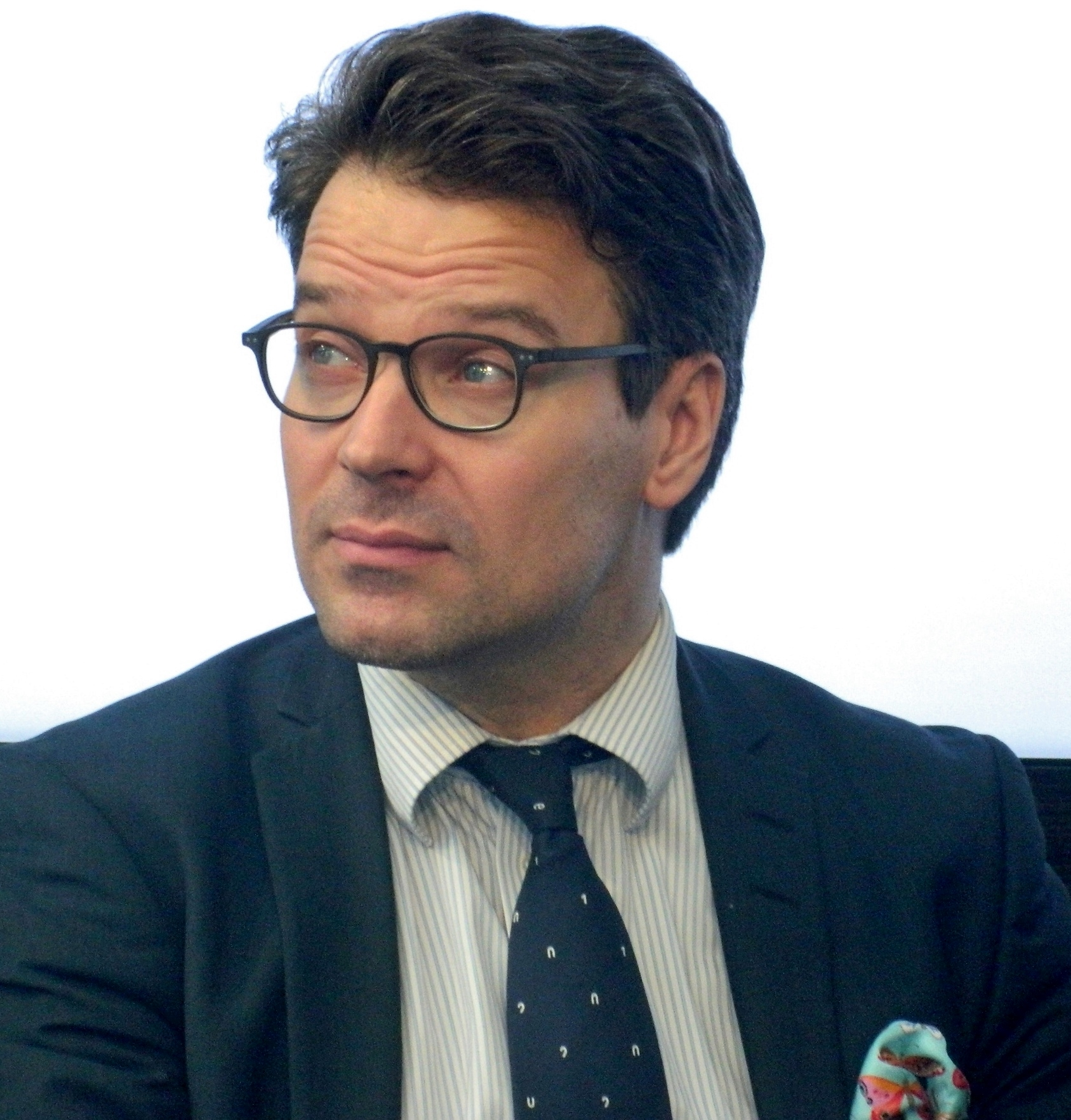 Vihreiden kansanedustaja Ville Niinistö Sanomatalon Mediatorilla 6. marraskuuta vuonna 2015